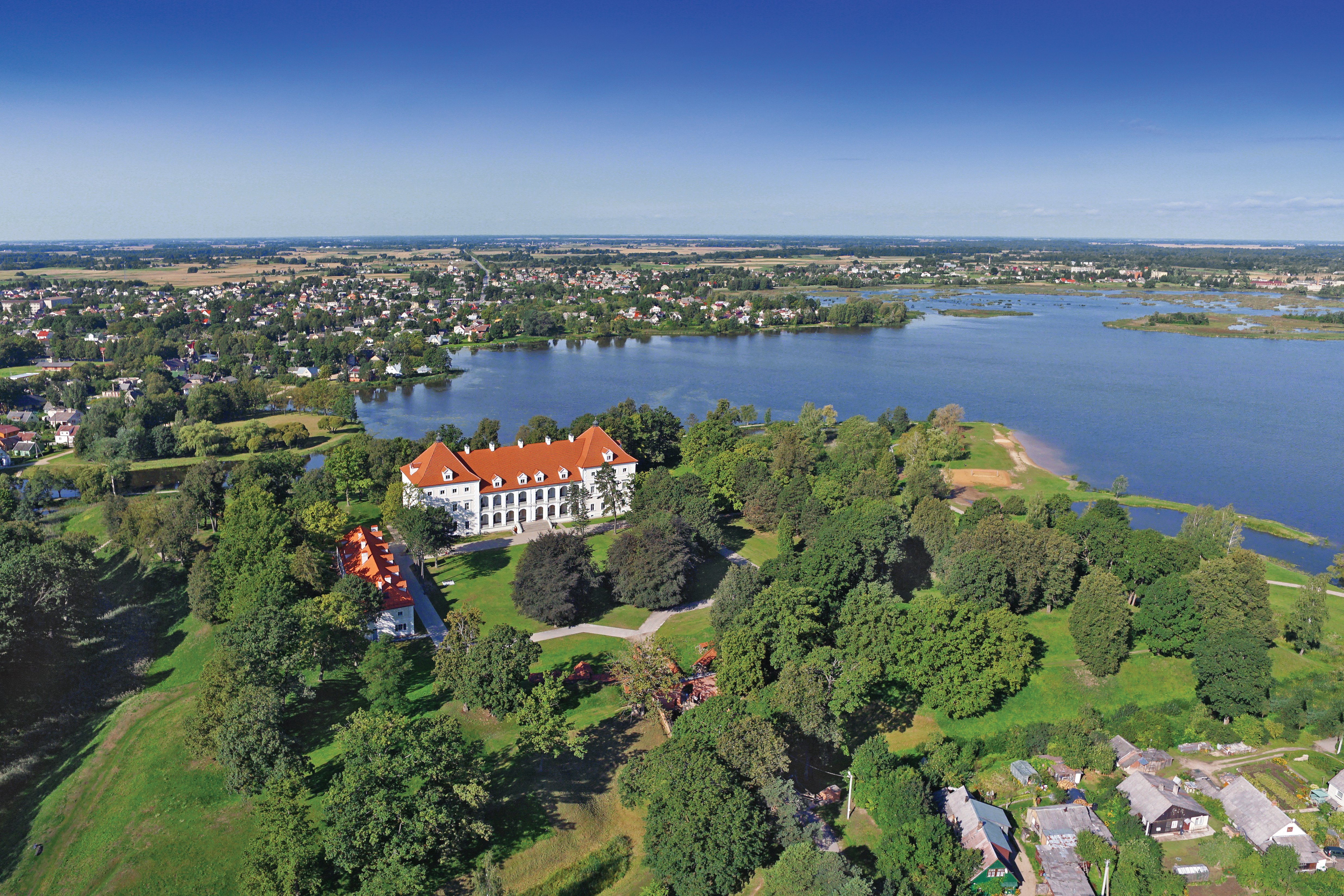 Nuotraukos autorius Fedirka